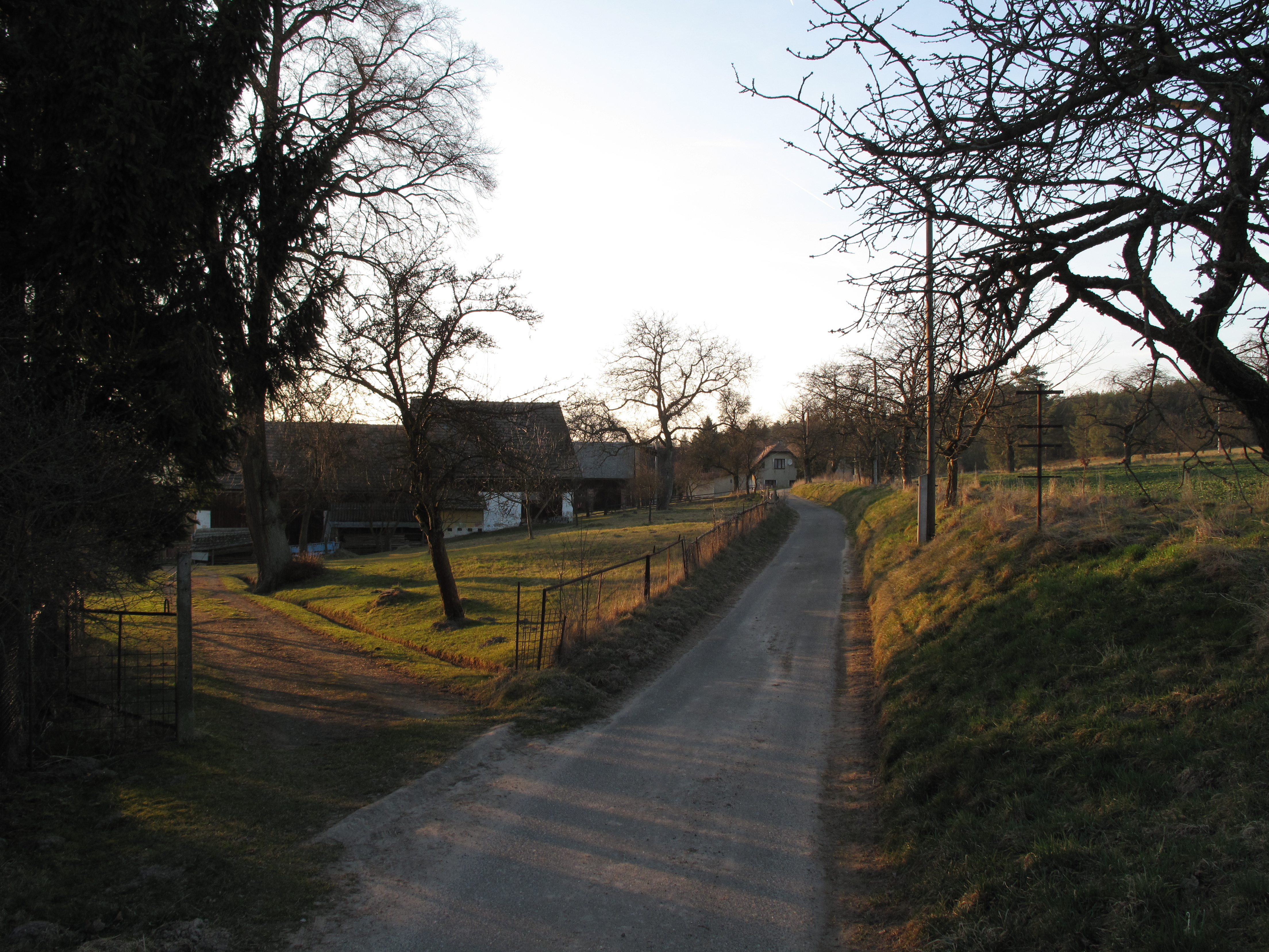 Cesta v Přibyslavicích. Okres Liberec, Česká republika.